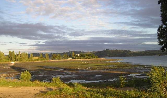 Playa de Nercón con marea baja, Castro, Chile.